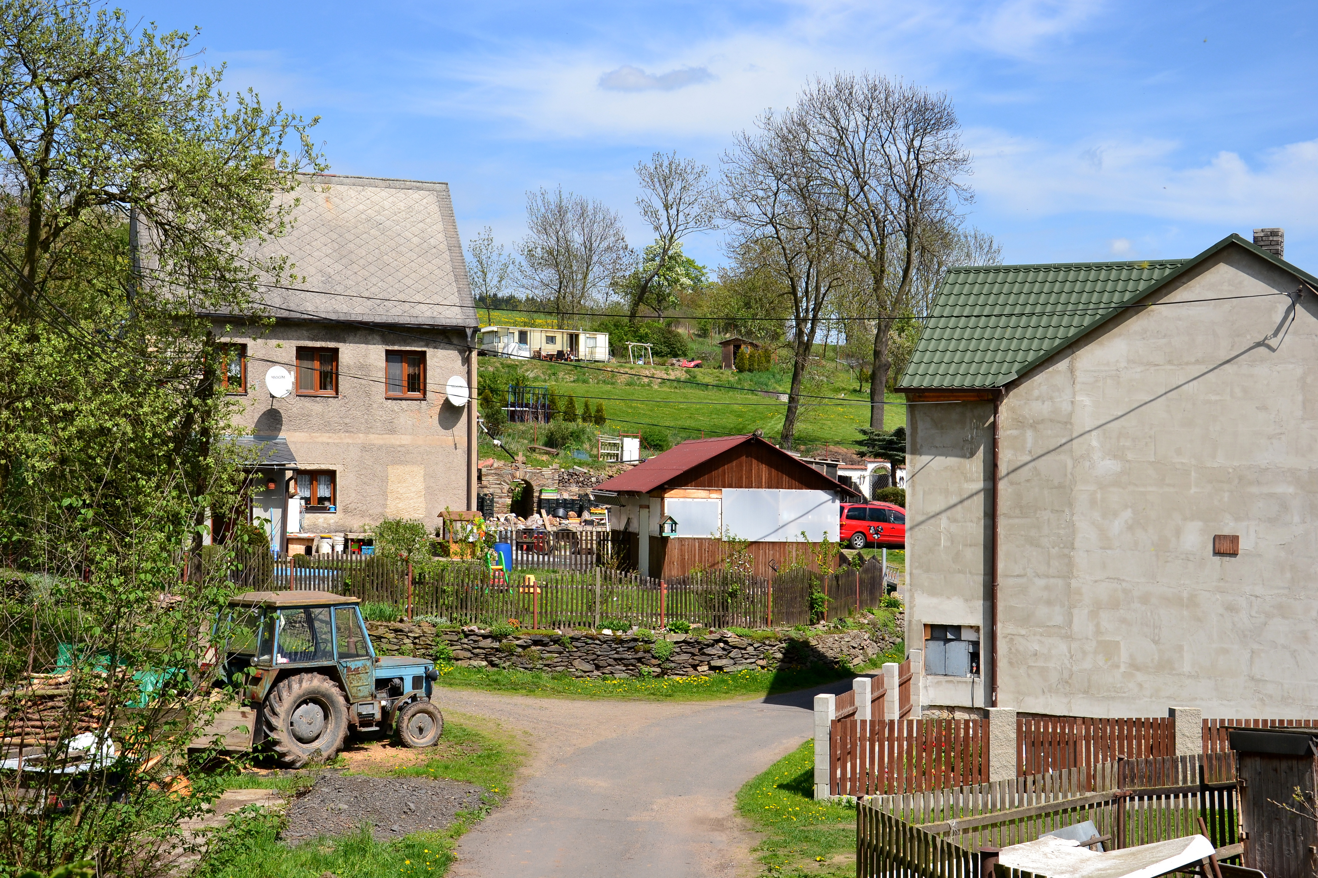 Petlery - střední část vesnice